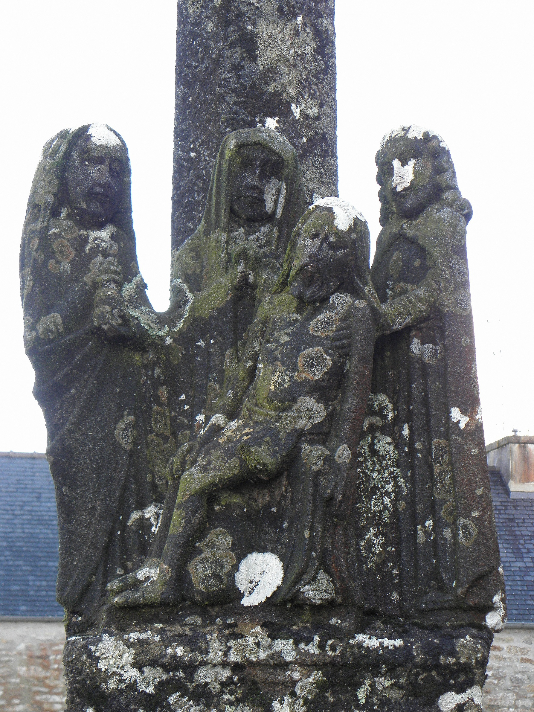 Pietà du calvaire de l'enclos paroissial de Brennilis (29) par Roland Doré.